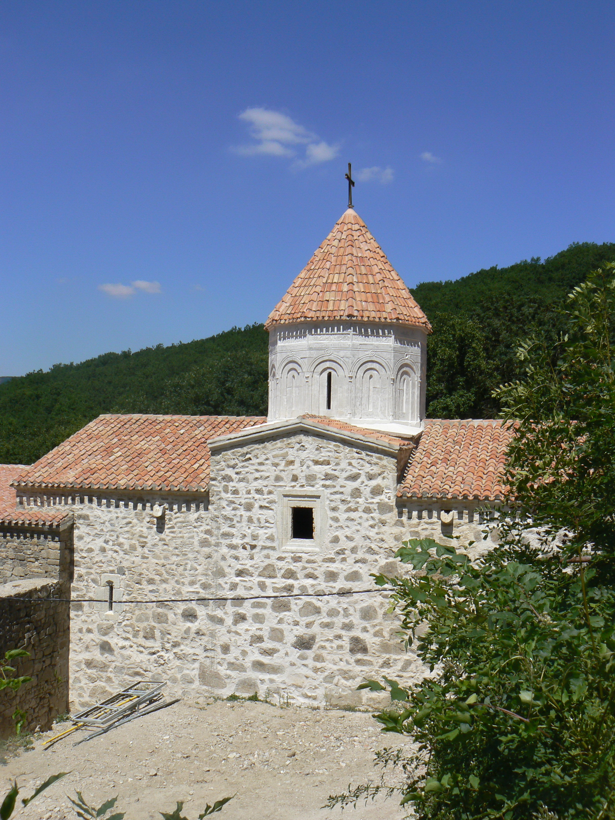 Церковь Сурб-Ншан (Знамения): 3 км к юго-западу от города, Старый Крым, Кировский район, Крым This object is located on the Crimean Peninsula and recognized as cultural heritage by Russia under the monument ID: 8230594001. The legal status of the Crimean region is currently disputed.